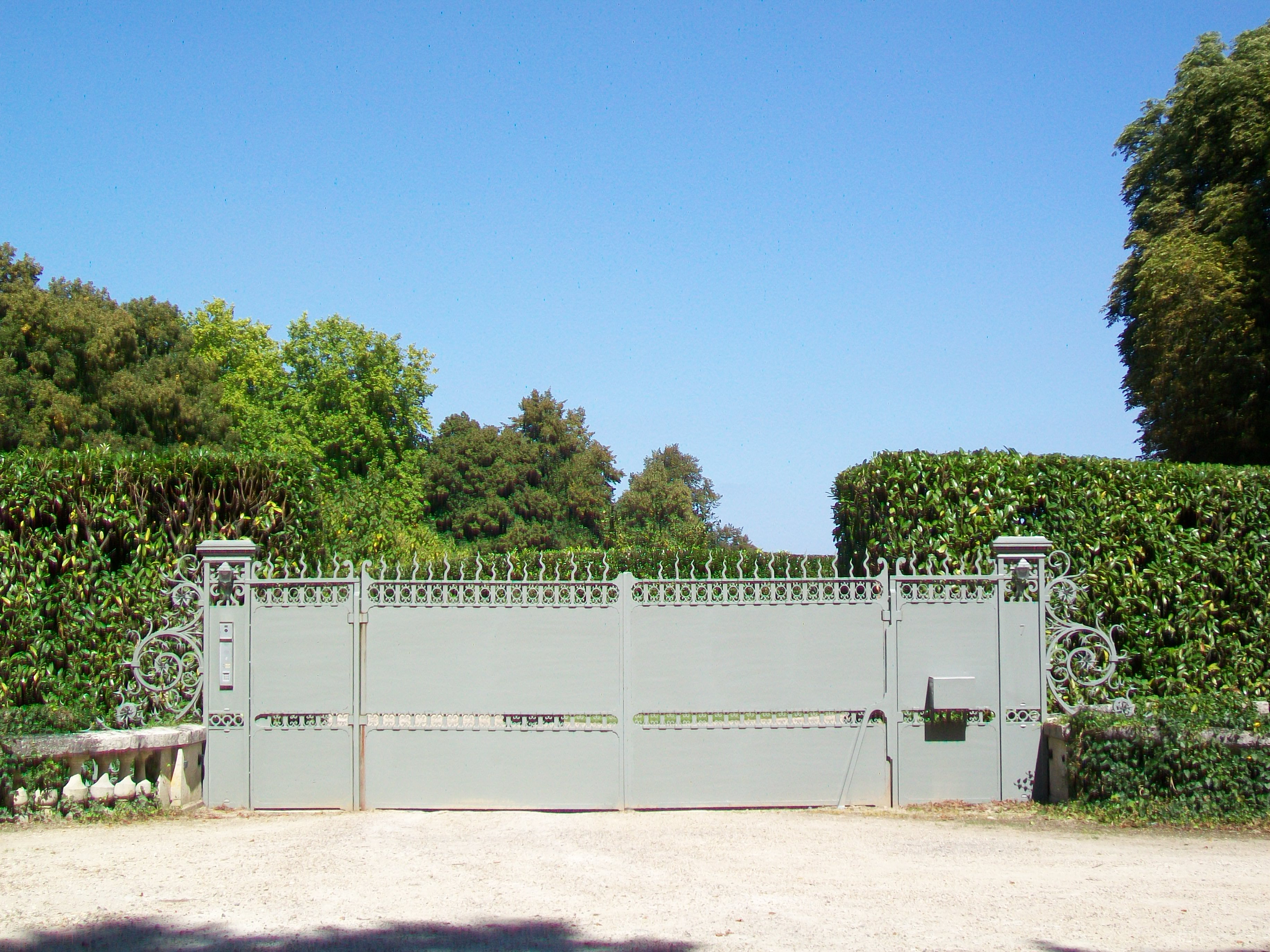 Portail à l'emplacement de l'ancienne grille du château. Le château se dressait derrière cette grille et était visible depuis la rue.